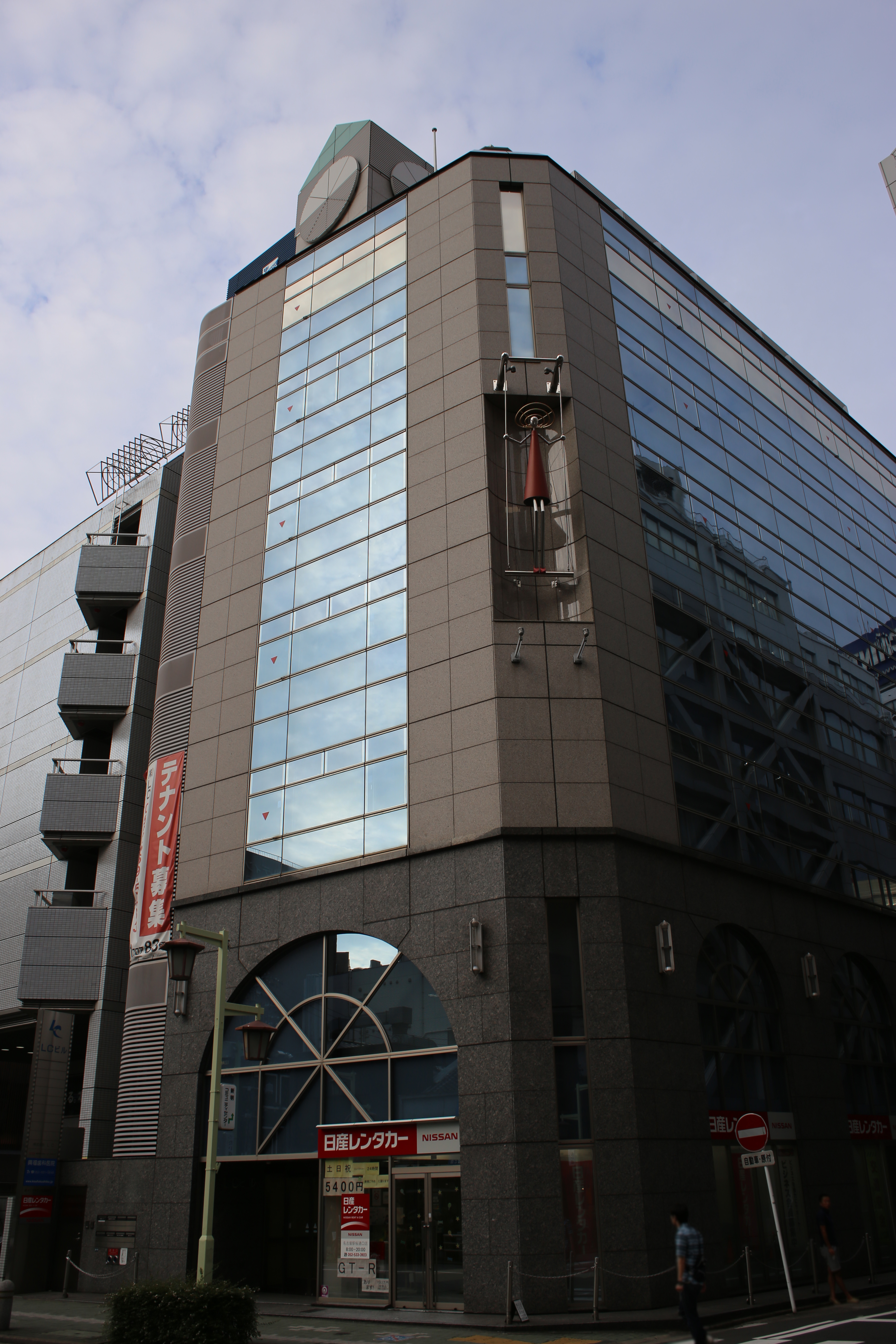 名古屋市中村区名駅三丁目のLCビルを西側公道南側より撮影。ただし、肖像権保護のための画像処理済。